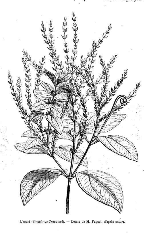 Urari, illustration de l'article de M. Crevaux. Revue française Le Tour du Monde, 1880/07 (40)-1880/12 page 112